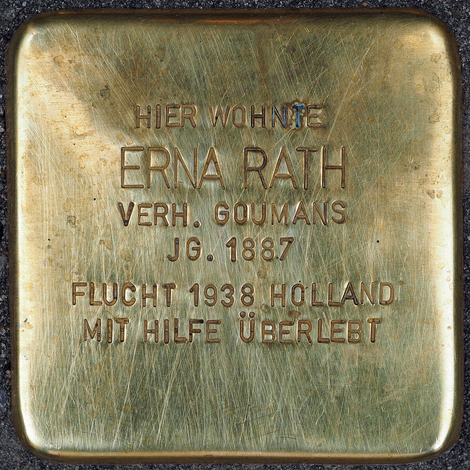 Stolpersteine Kempen: Rath, Erna